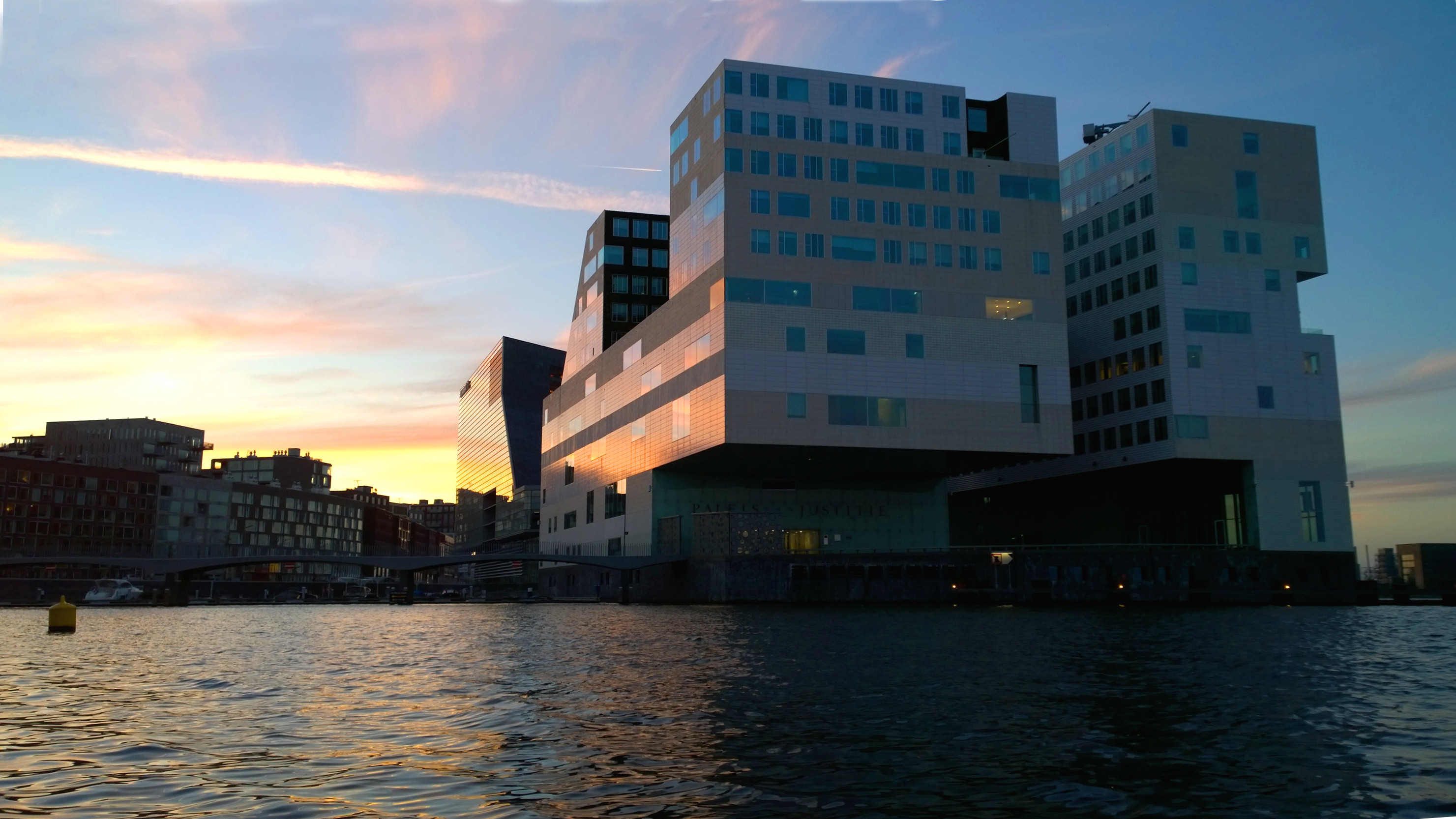 Gezicht op het IJdock vanaf het water van de Westertoegang